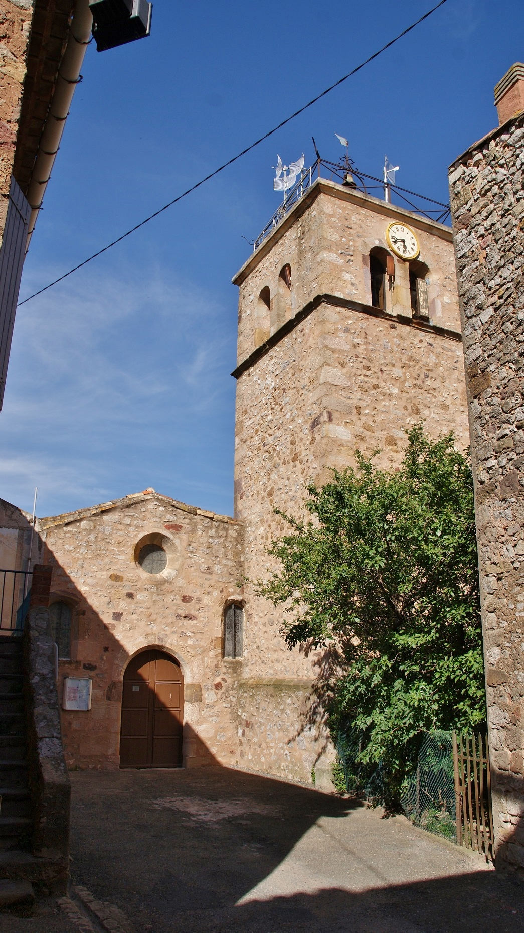 Église Notre-Dame-de-l'Assomption de Villespassans (34).